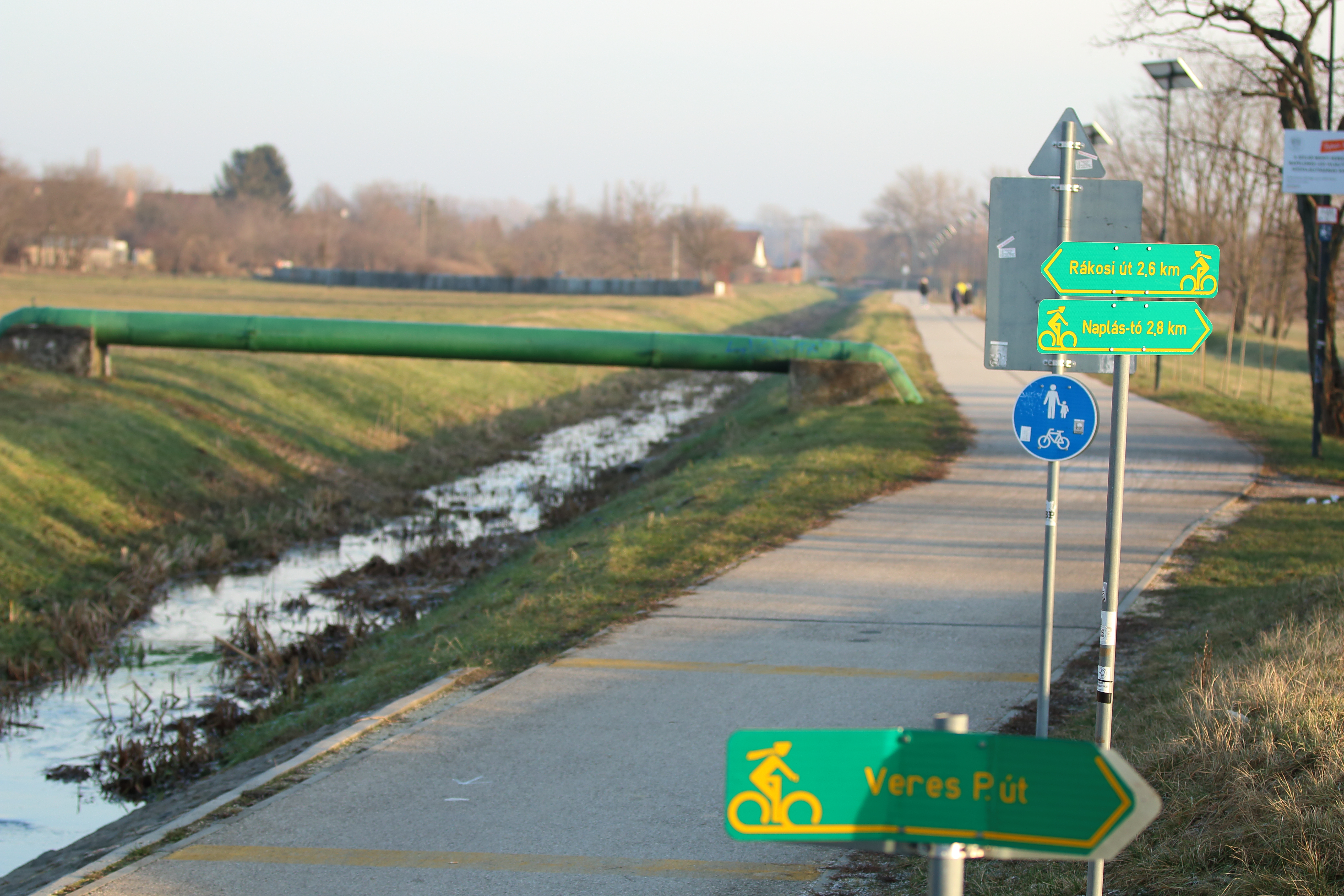 A Szilas-patak-menti kerékpárút irányjelző táblái